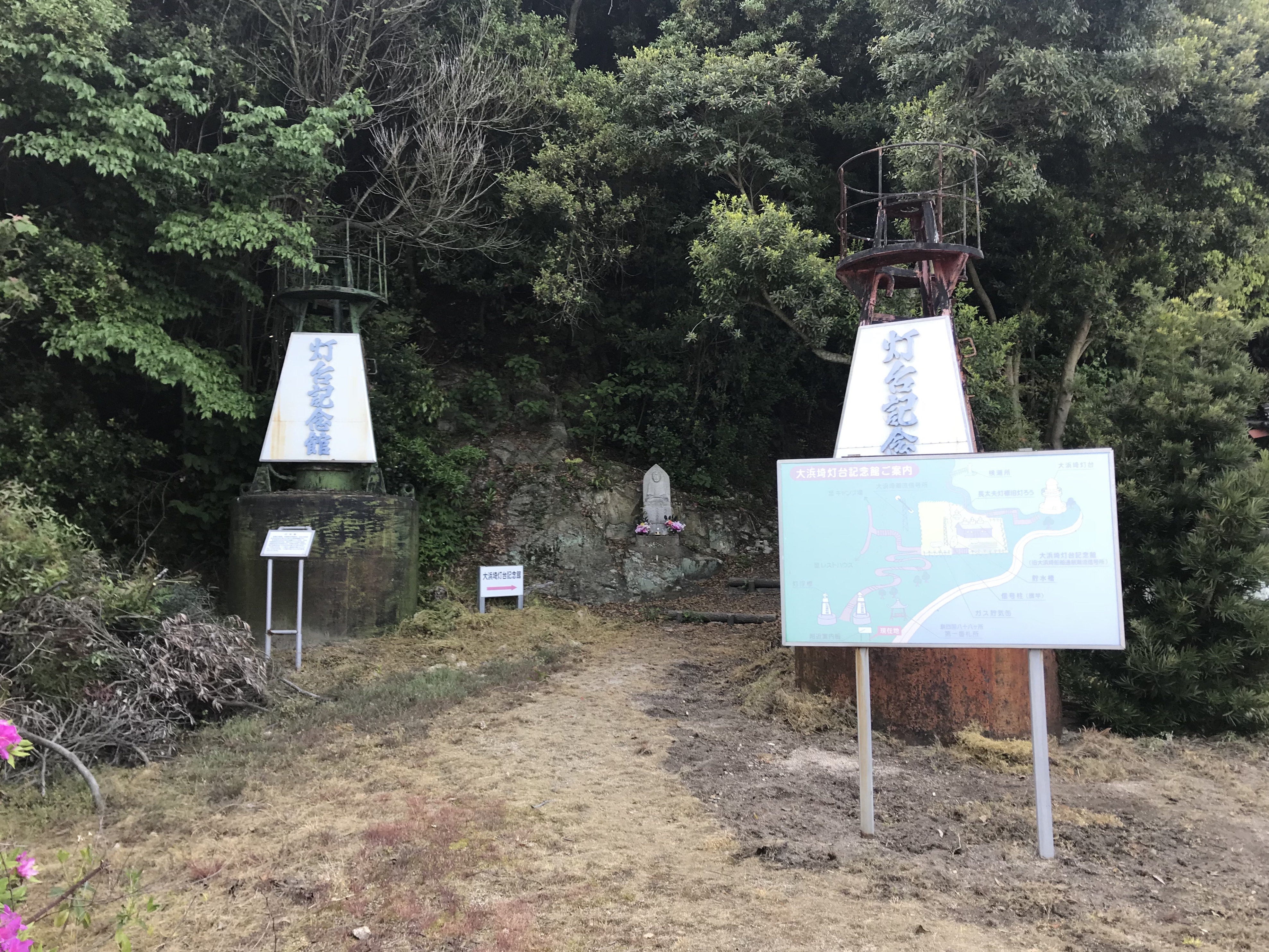 因島大橋記念公園・大浜埼灯台への道